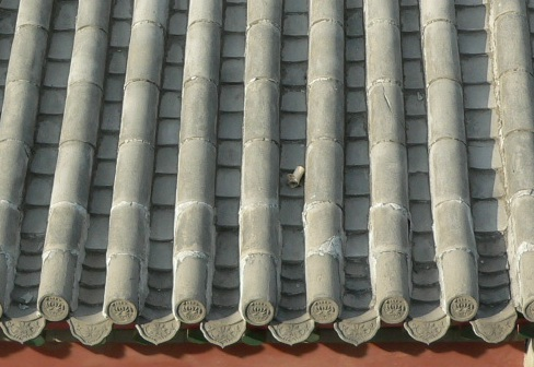 筒瓦 拍摄